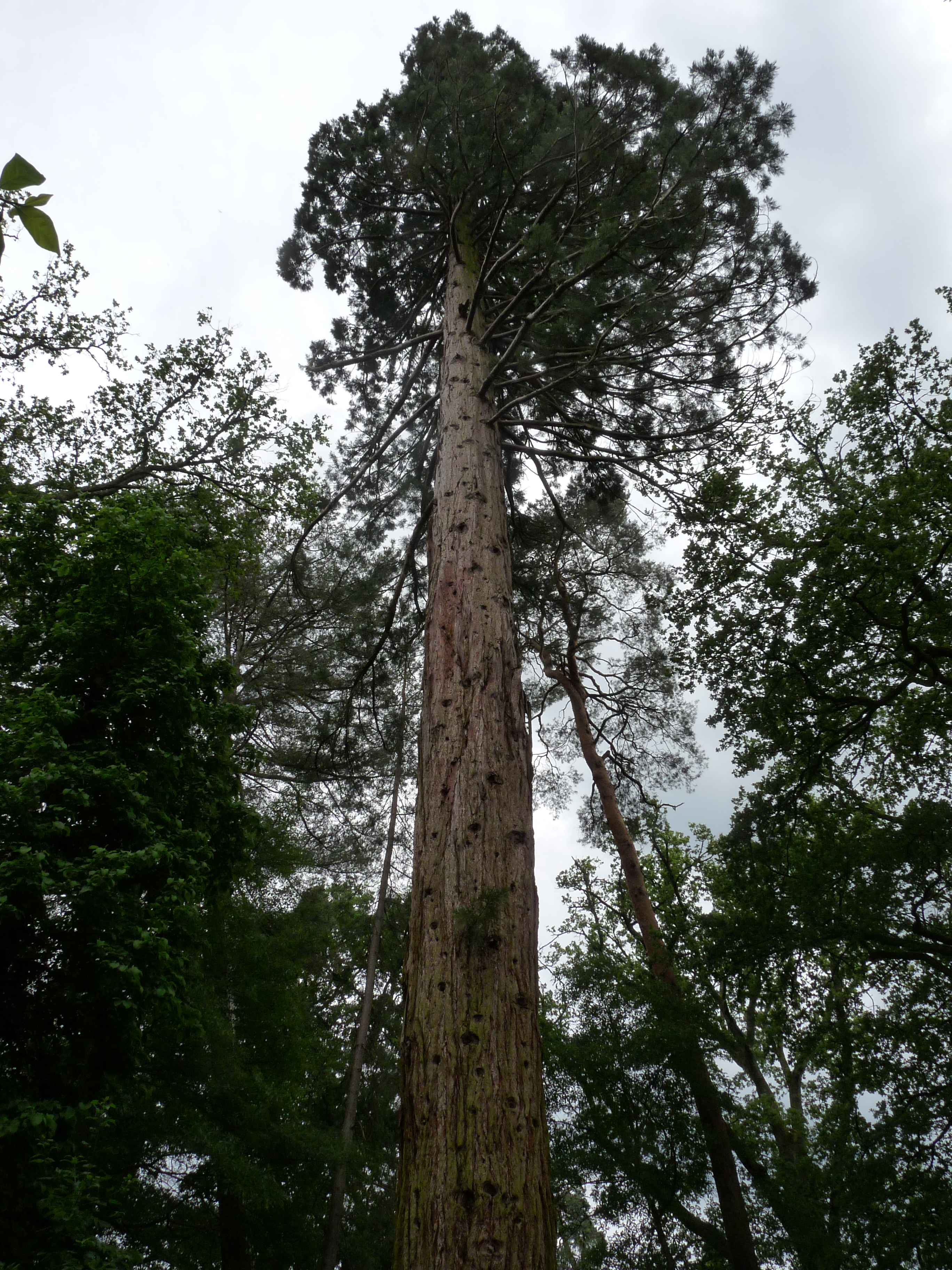 Sequoia géant à l'arboretum de Balaine (Allier, France).